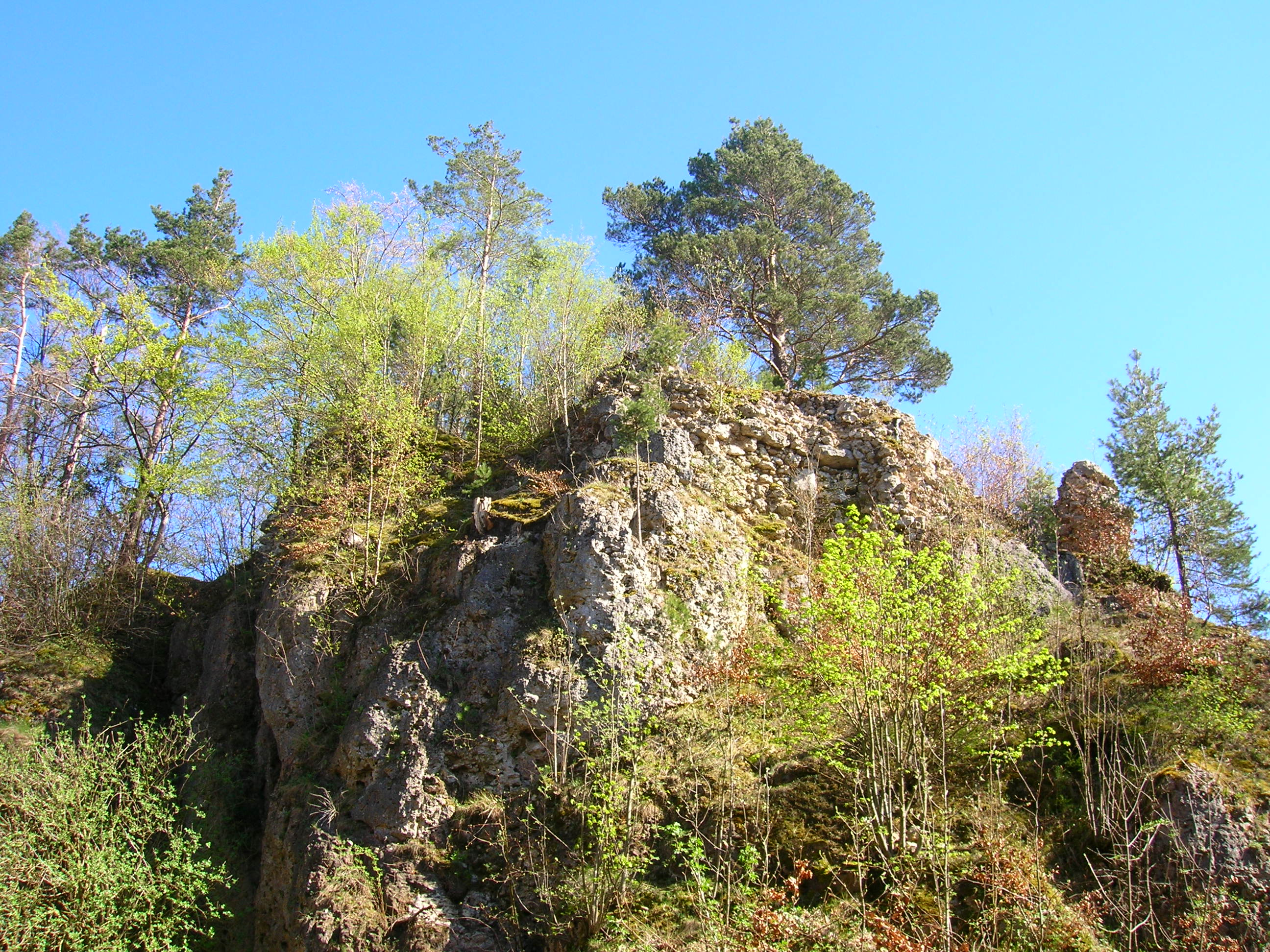 Ansicht der Oberburg der Ruine Hauseck von Nordwesten